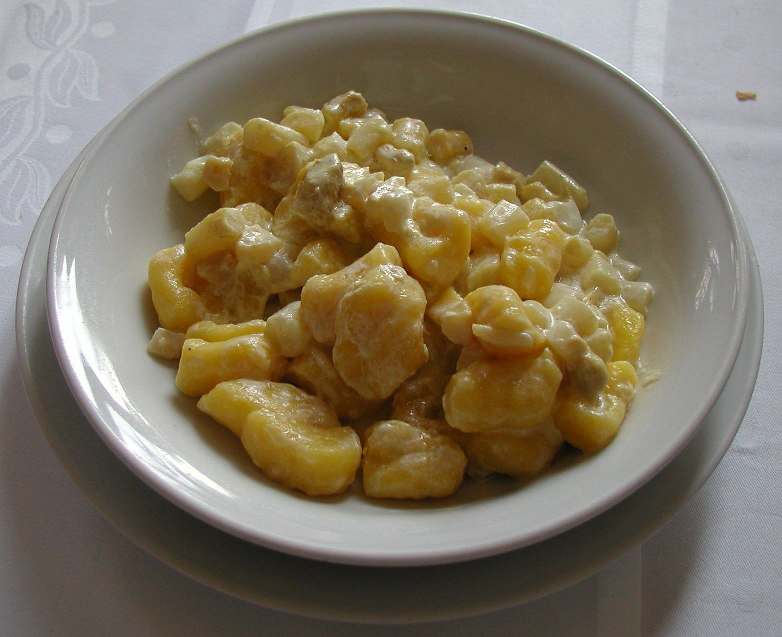 Gnocchi al sugo di asparagi di Vicenza